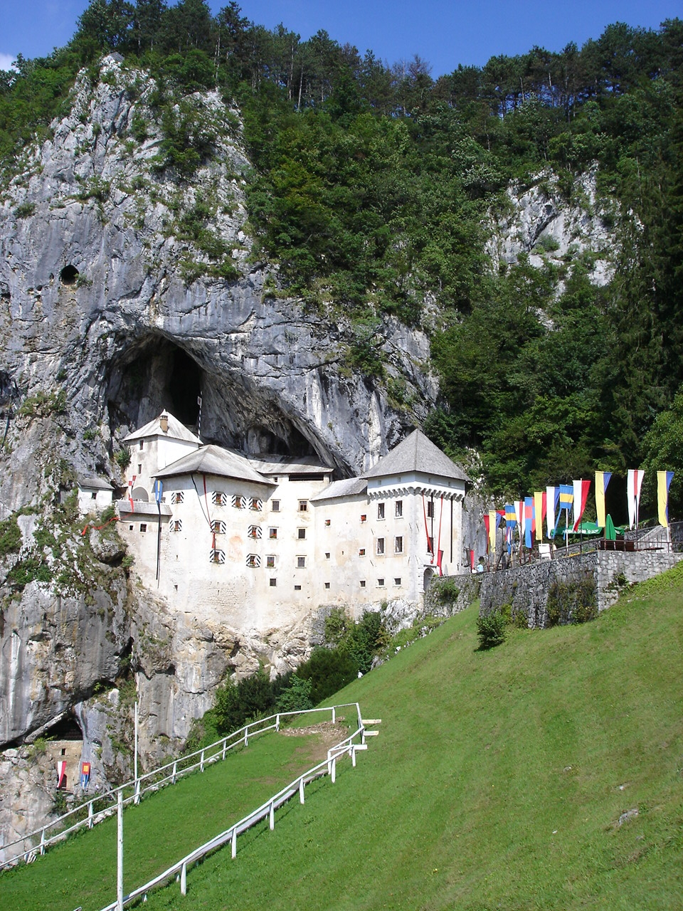 castle Predjama, Slovenia